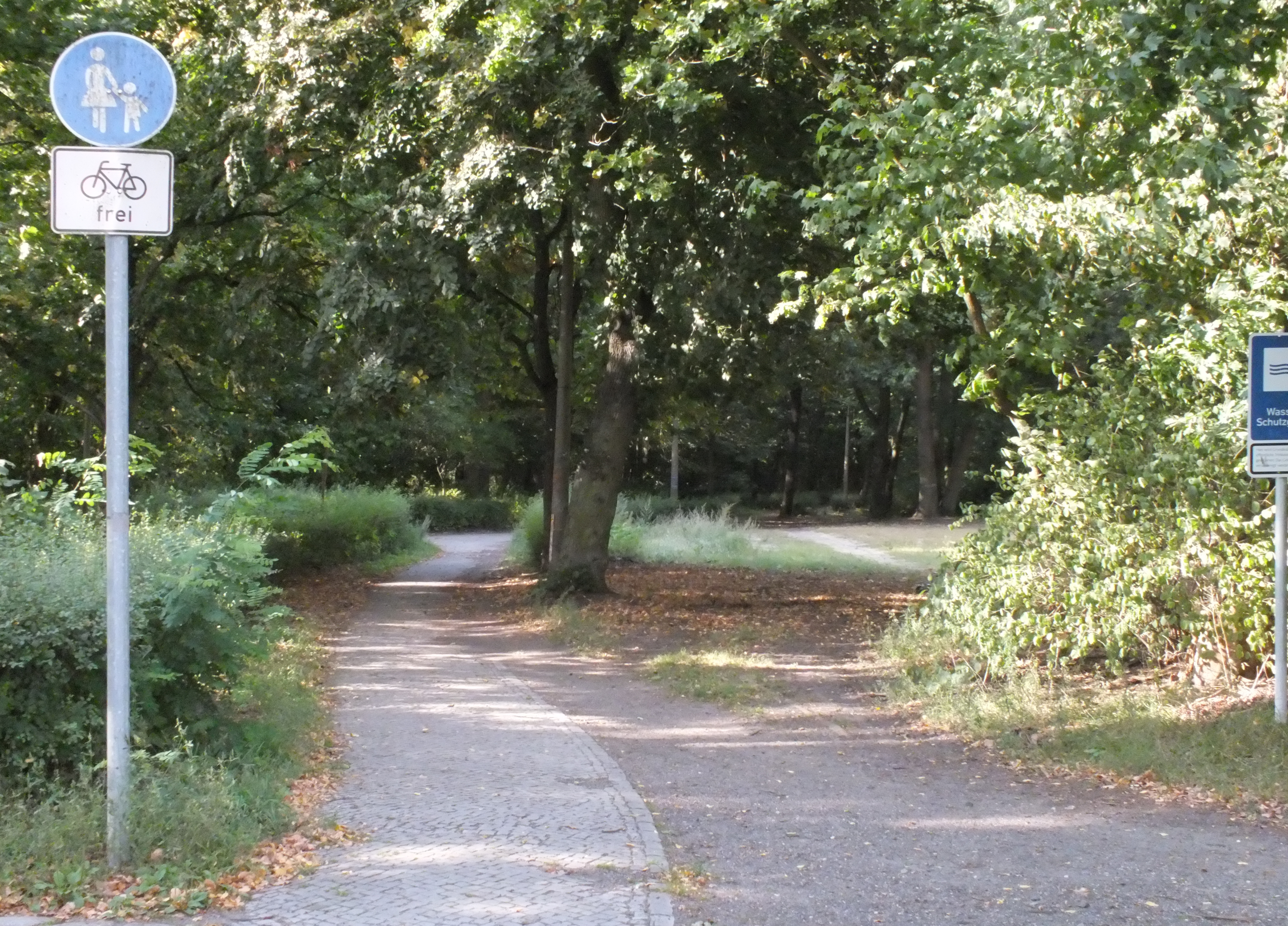 Straße in Berlin-Rahnsdorf, Hegemeisterweg